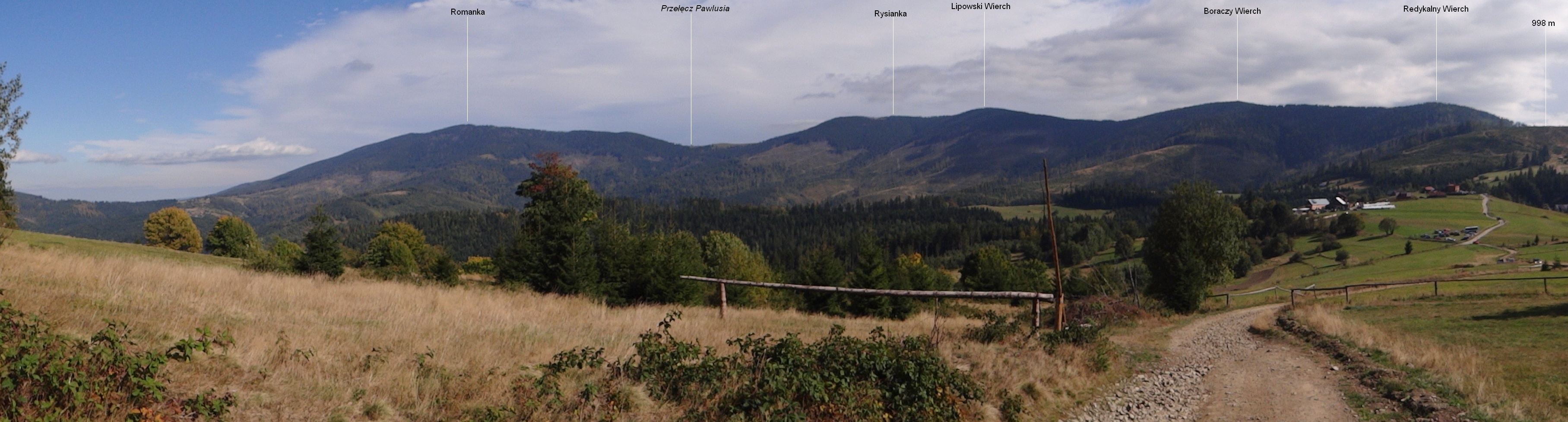 Hala Boracza i panorama widokowa